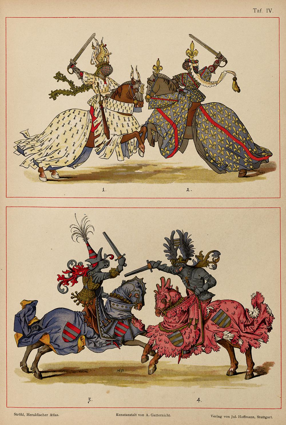 Hugo Gerhard Ströhl: "Heraldischer Atlas". Stuttgart 1899. Tafel 4, "Turnier-Ritter", Tafel